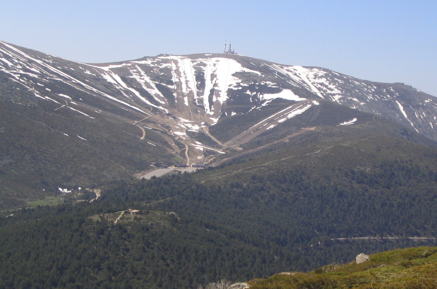 Vista de la cara norte de la Bola del Mundo y la estación de esquí Valdesquí (Sierra de Guadarrama), España.